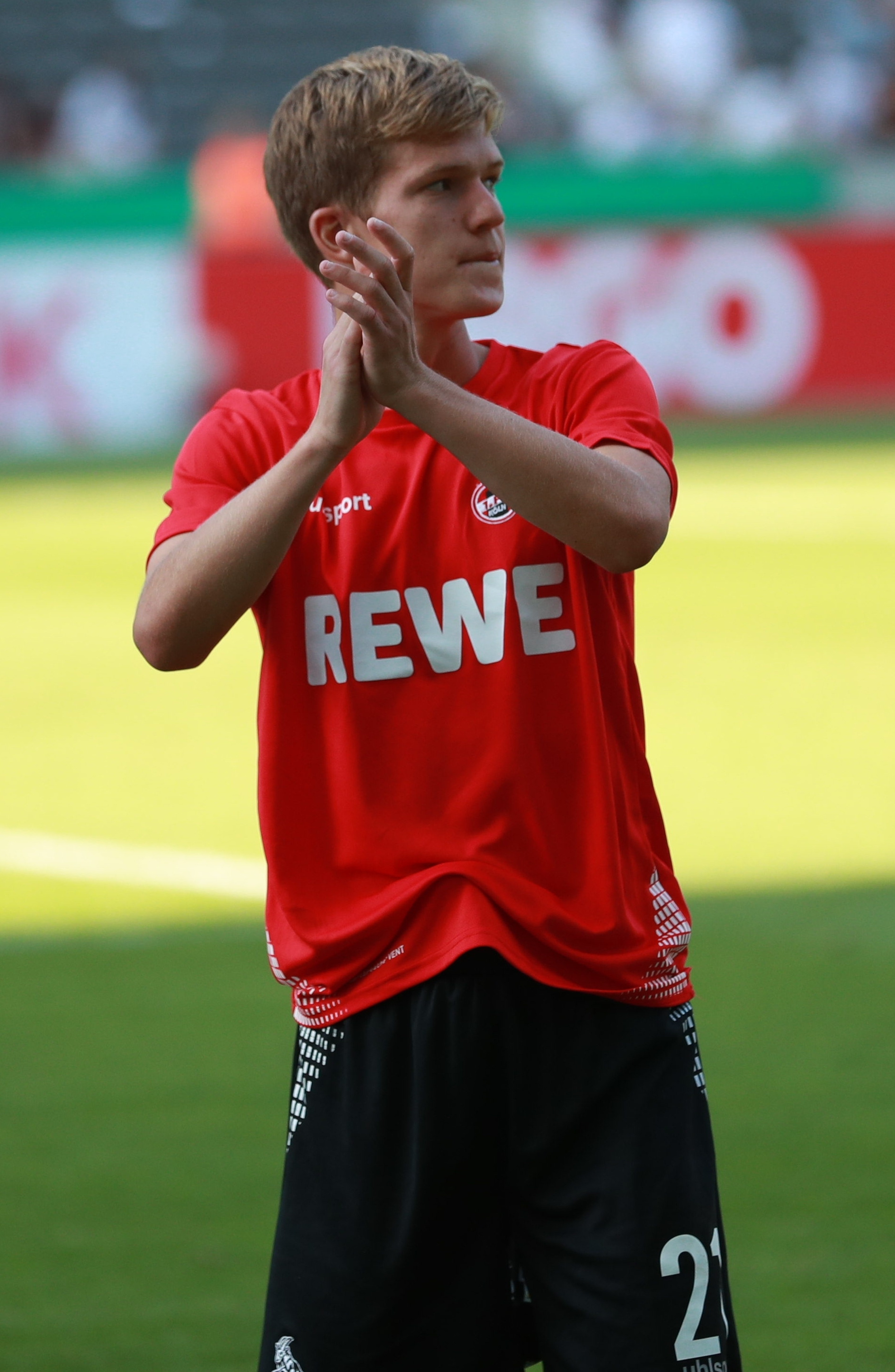 DFB-Pokal 2018/19, 1. Hauptrunde: BFC Dynamo gegen 1. FC Köln 1:9 (1:4)